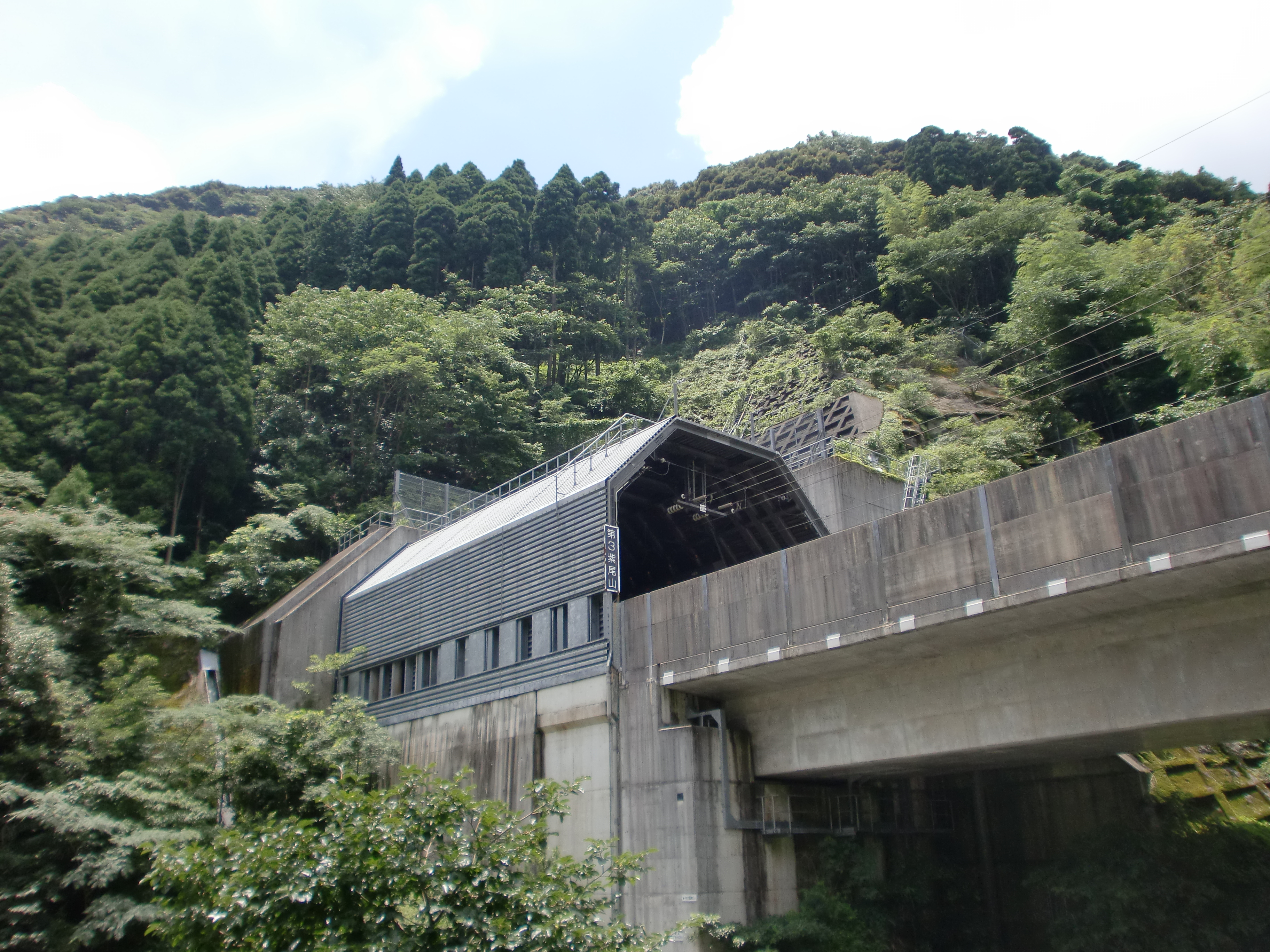 第三紫尾山トンネル（出水側坑口）の画像